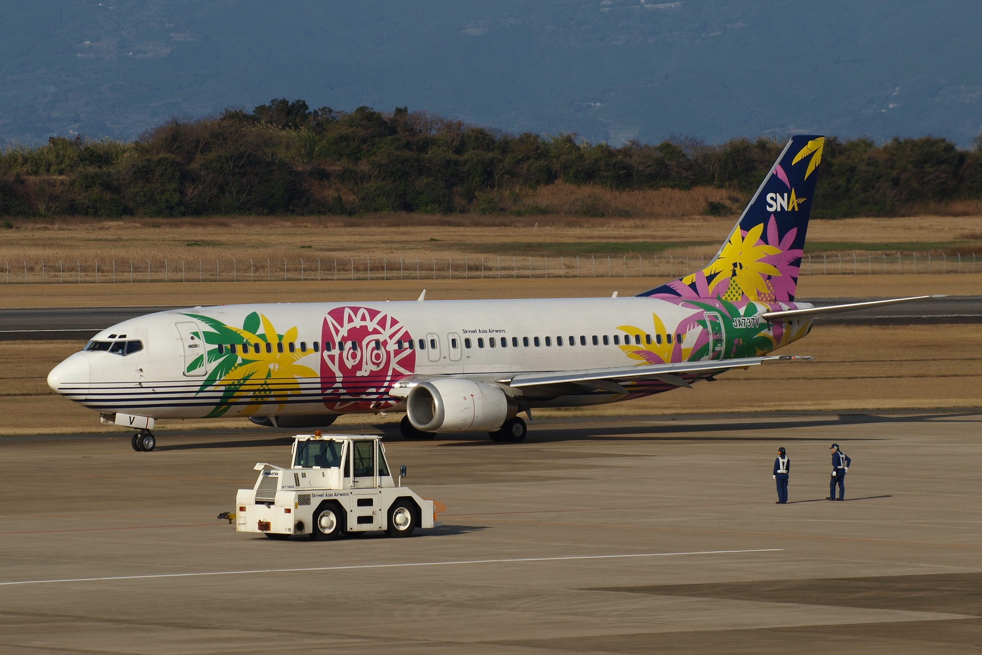 スカイネットアジア航空のボーイング737-400型機。2009年3月に長崎空港にて撮影